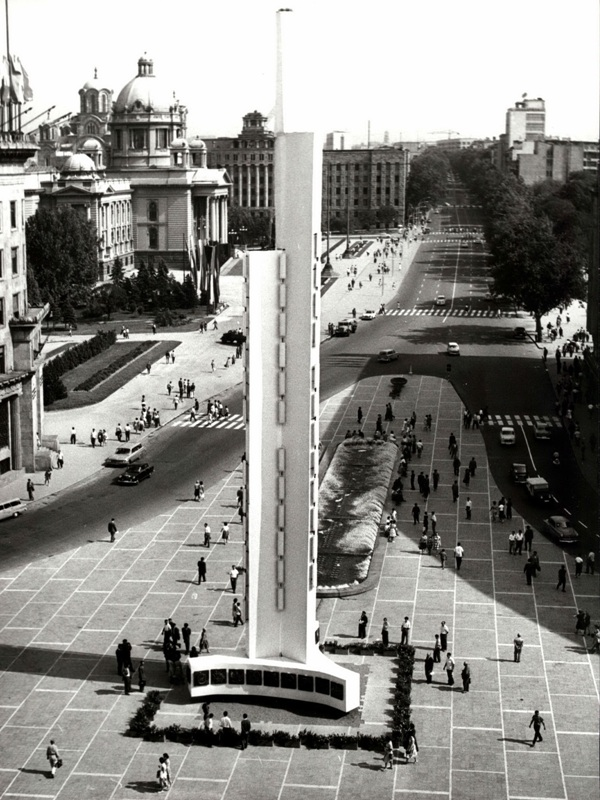 Srpski (latinica): Izgled Beograda za vreme konferencije Pokreta nesvrstanih 1961. godine